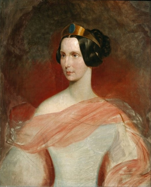 Императрица Александра Федоровна